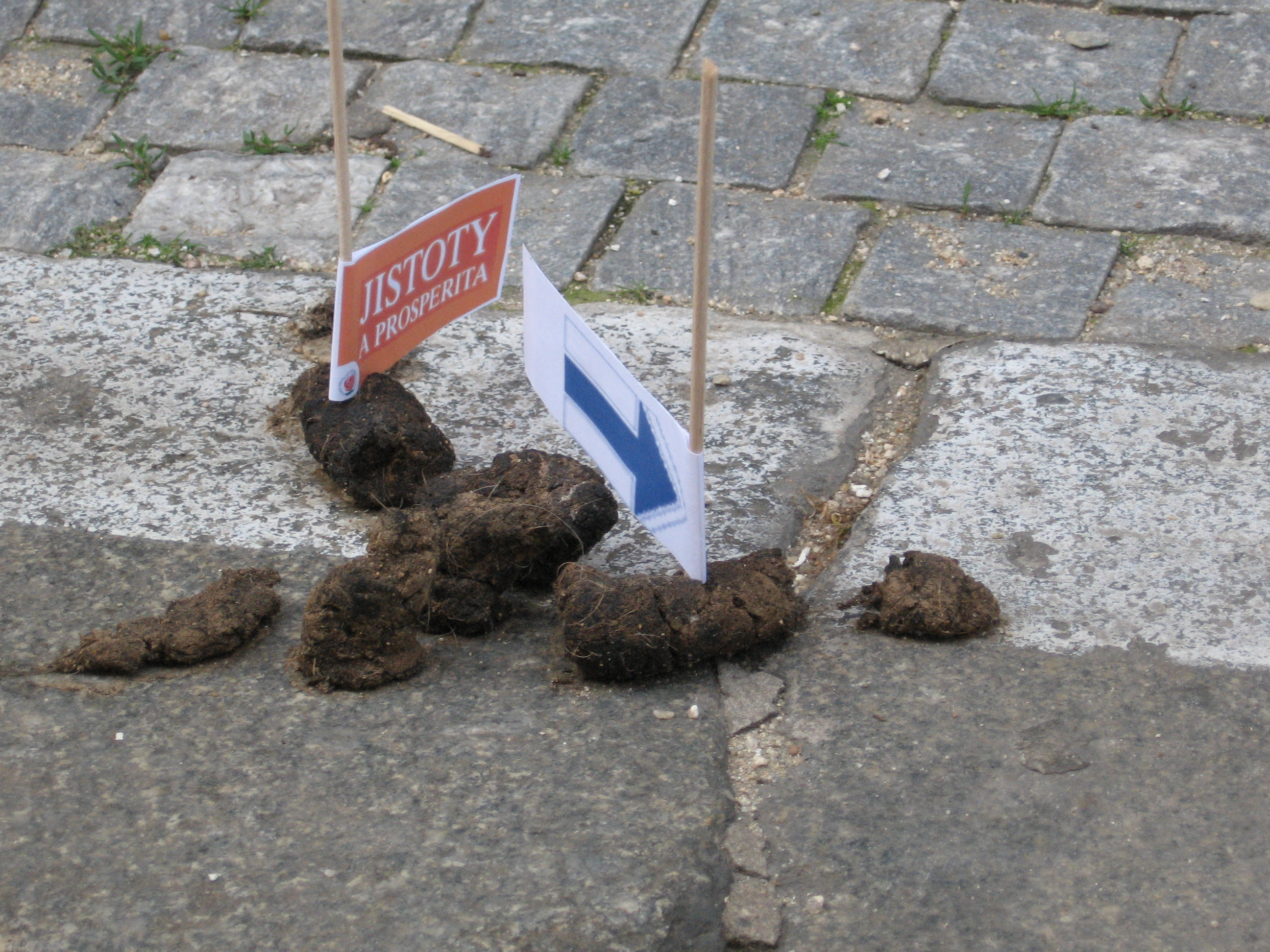 Chodník Dittrichovy ulice v Praze odpoledne v sobotu 3. června 2006 (po uzavření volebních místností)